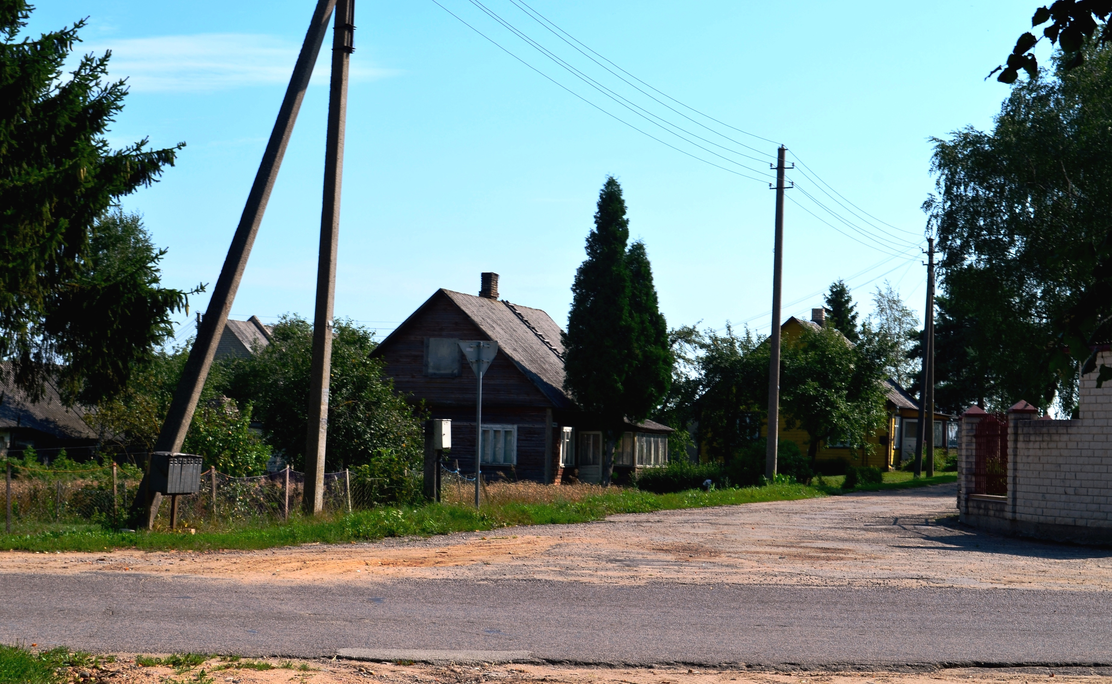 Trumpoji g., Truskava, Kėdainių r.